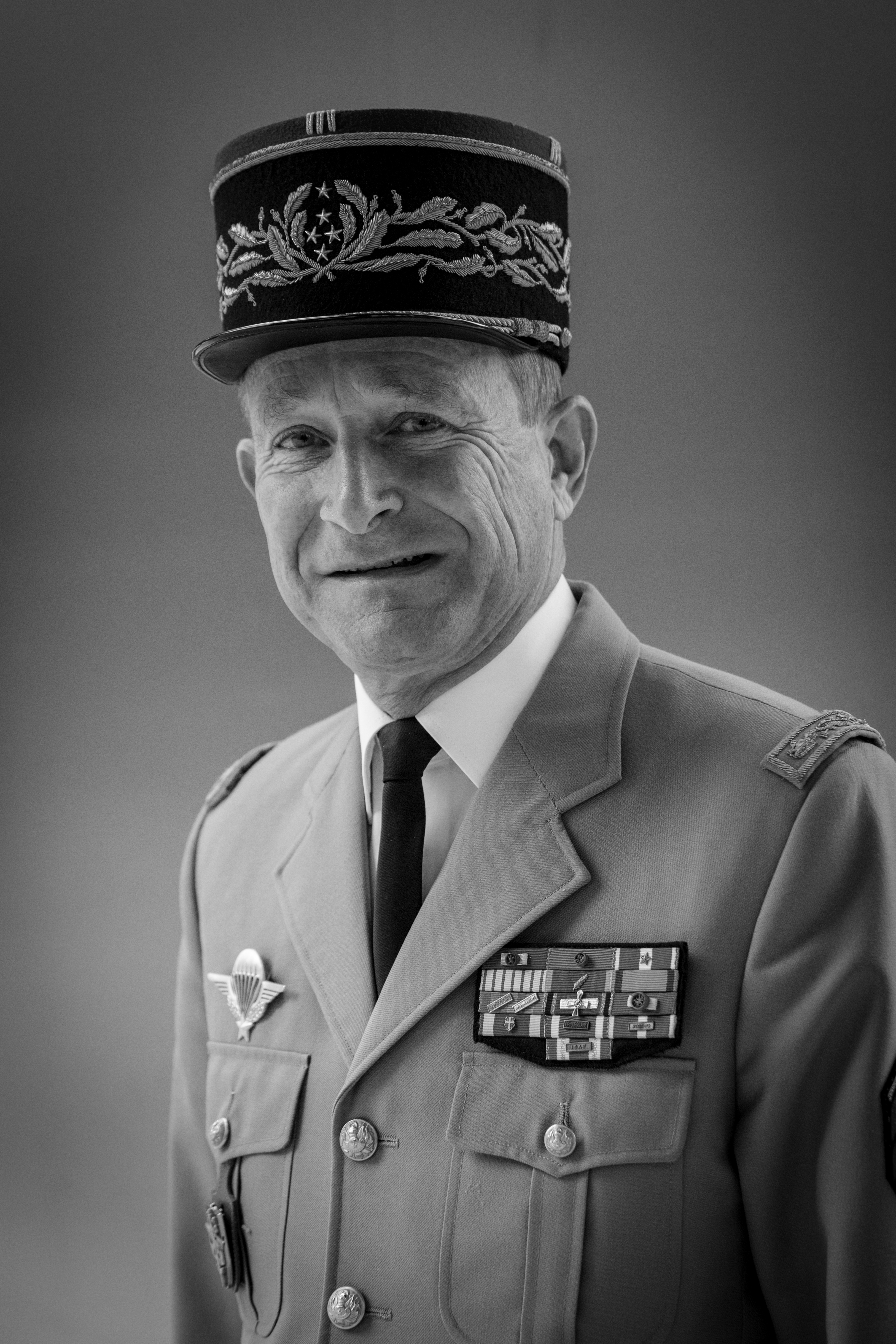 Pierre de Villiers par Claude Truong-Ngoc septembre 2015.jpg